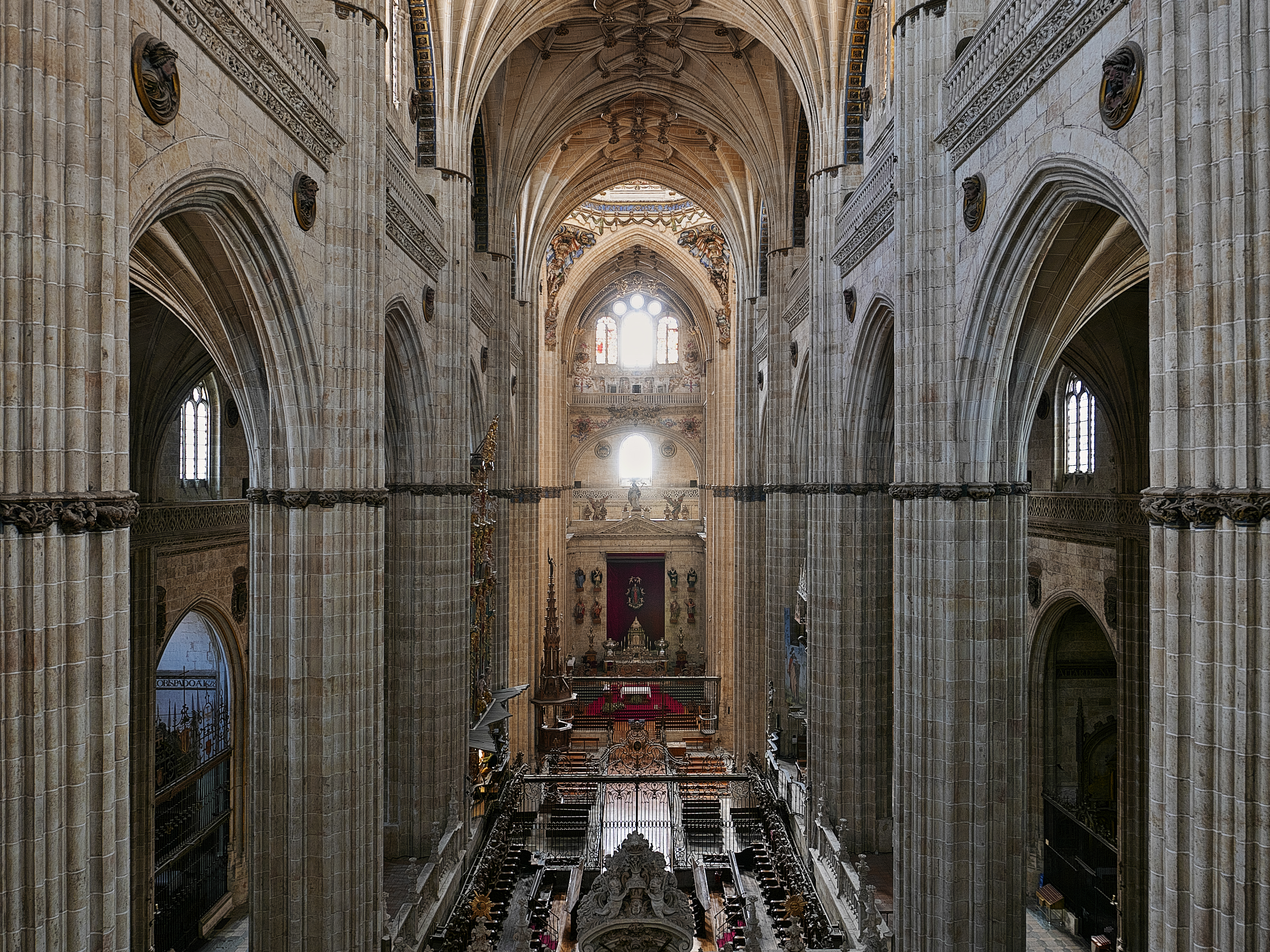 Nave central de la Catedral Nueva. Alonso Rodríguez, maestro de la Catedral de Sevilla y Antón Egas dan unas trzas para la catedral (1510)